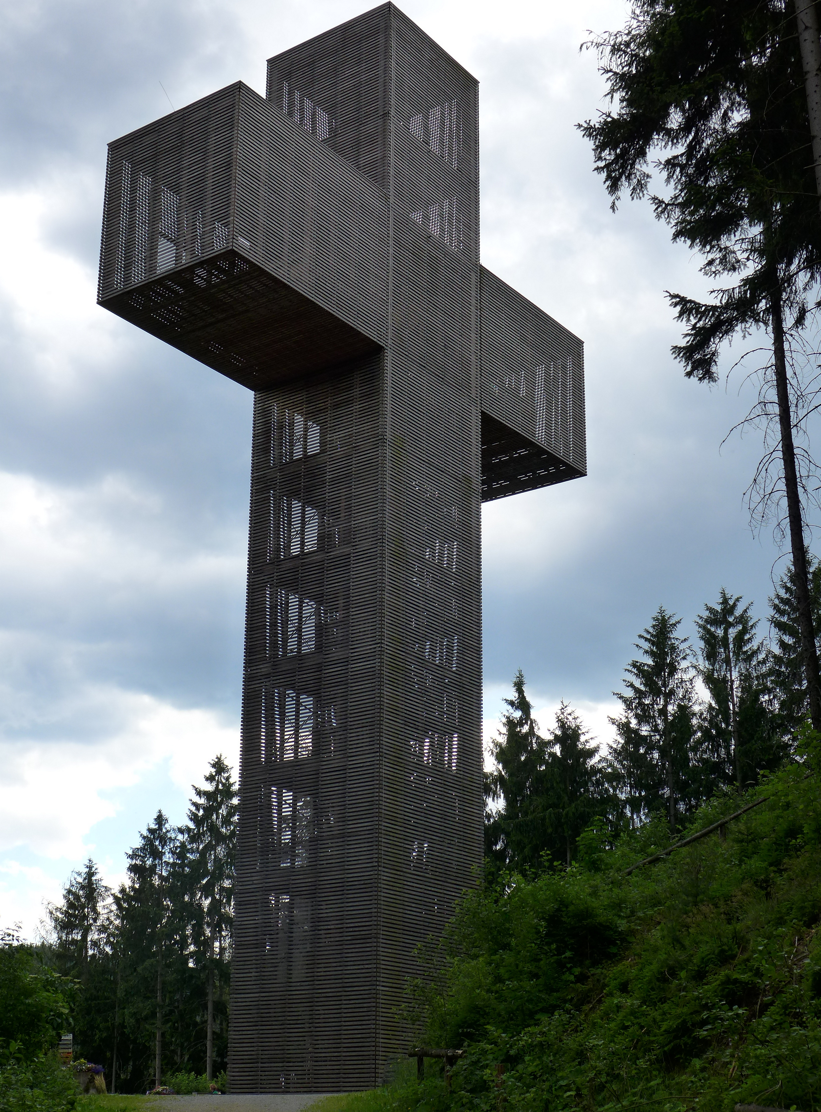 Veitsch - Pilgerkreuz am Veitscher Ölberg